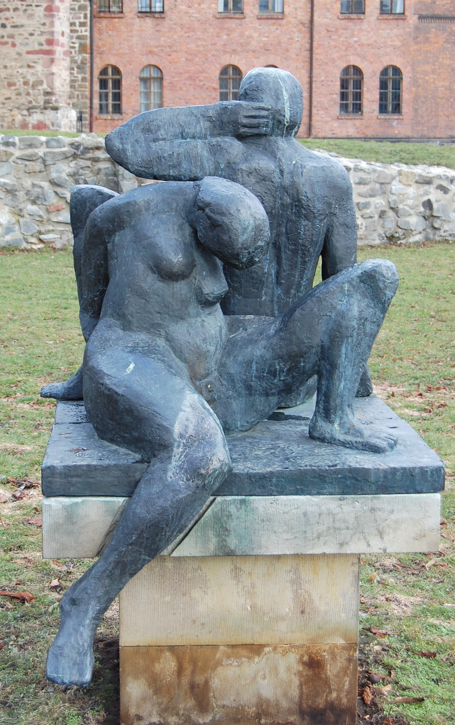 Plastik Werra und Saale in Magdeburg von Werner Stötzer